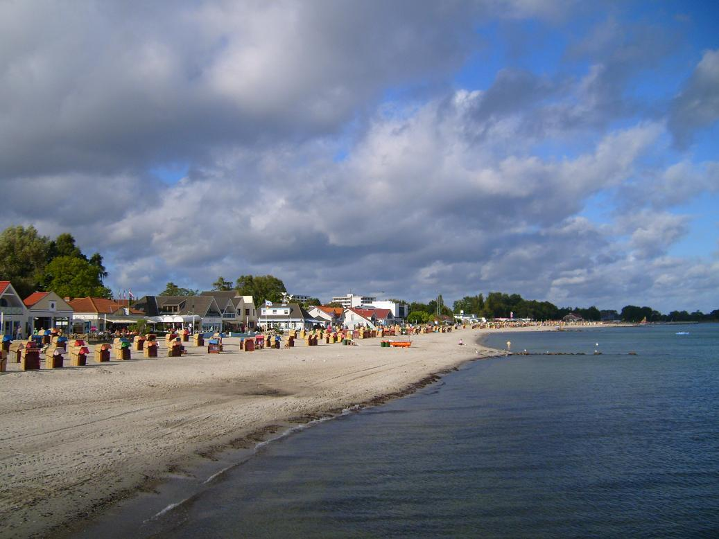 Побережье Келленхузена